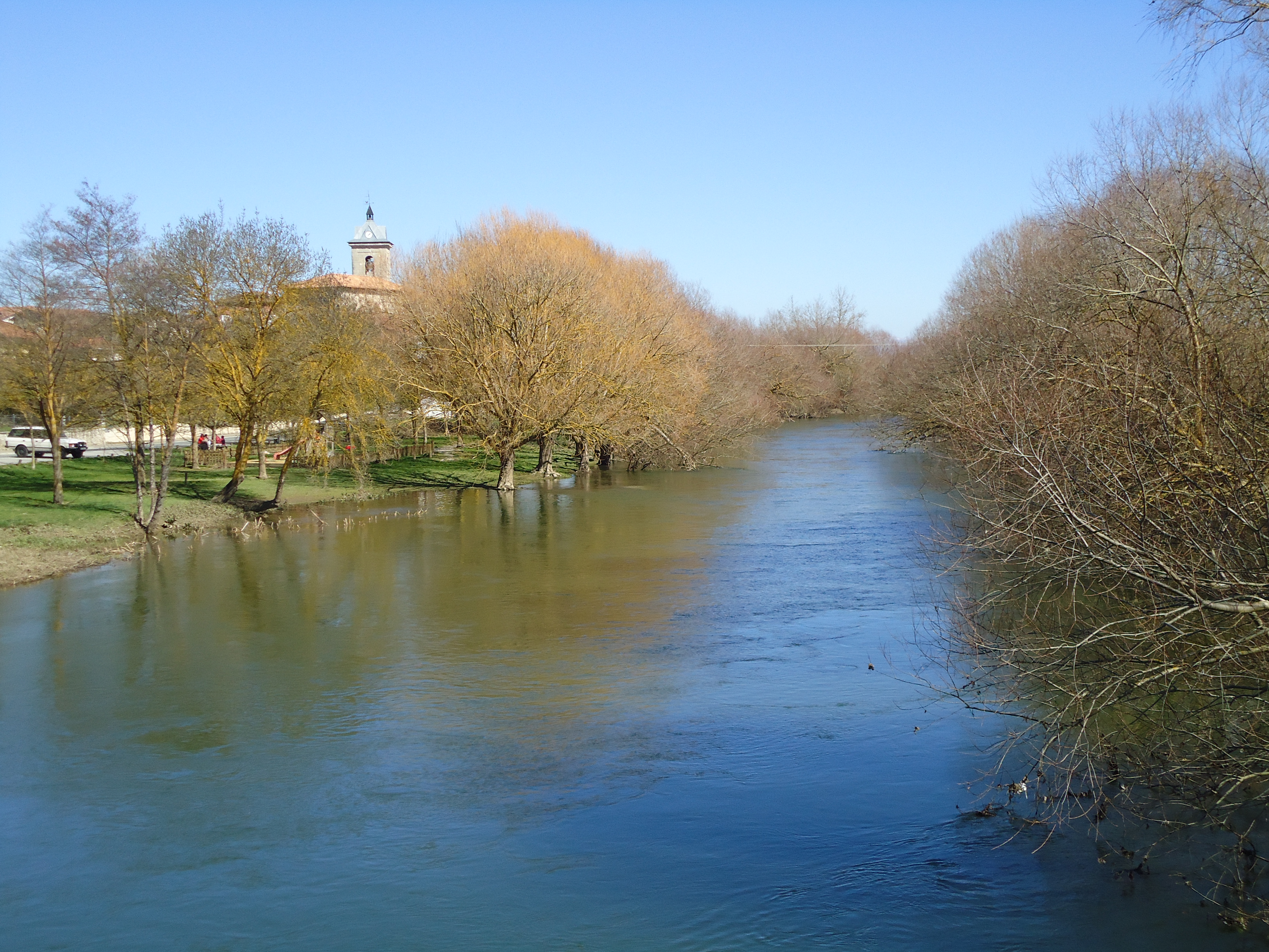 Zadorra ibaia Tresponden (Iruña Oka, Araba)